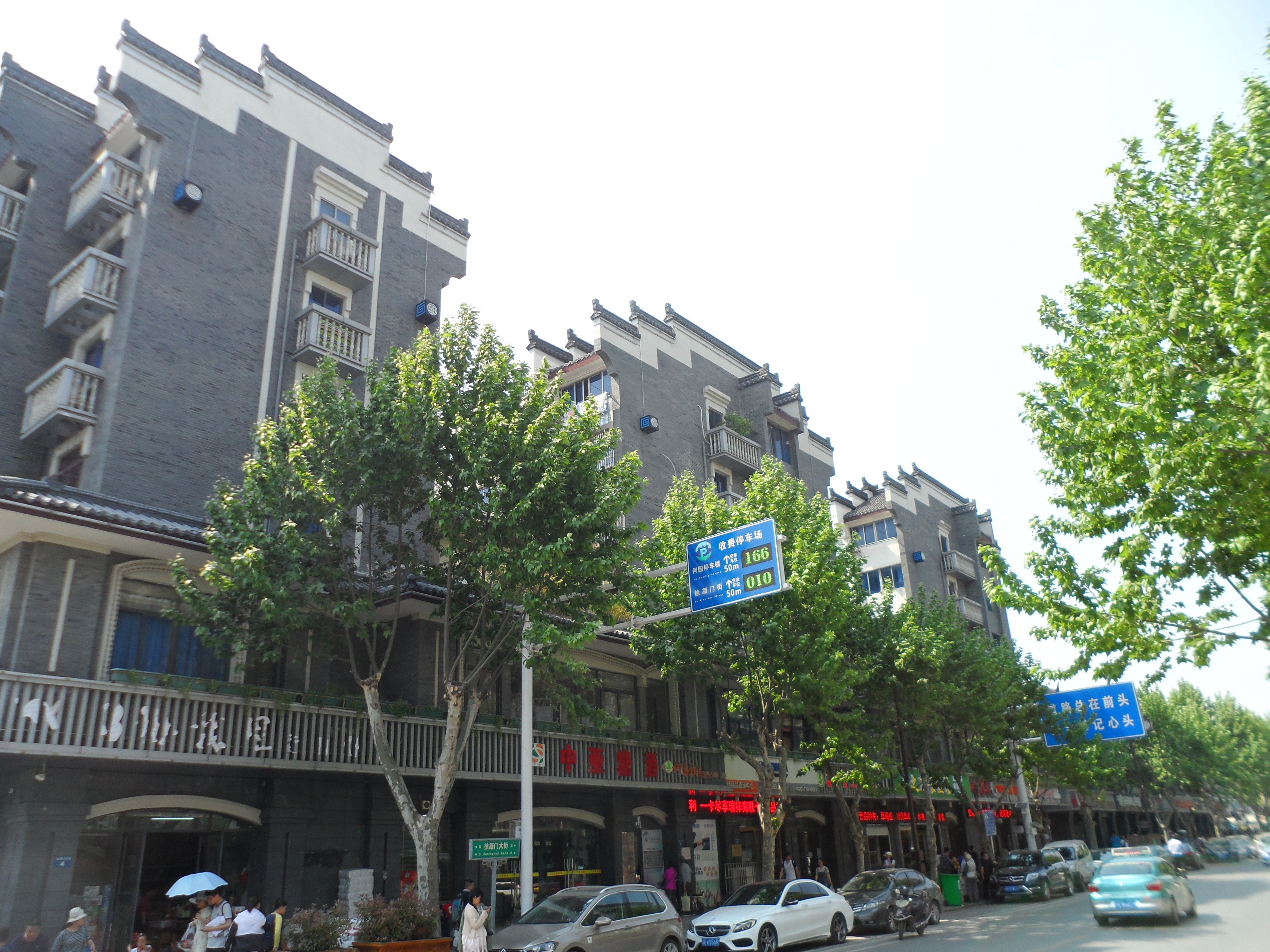 扬州的街道